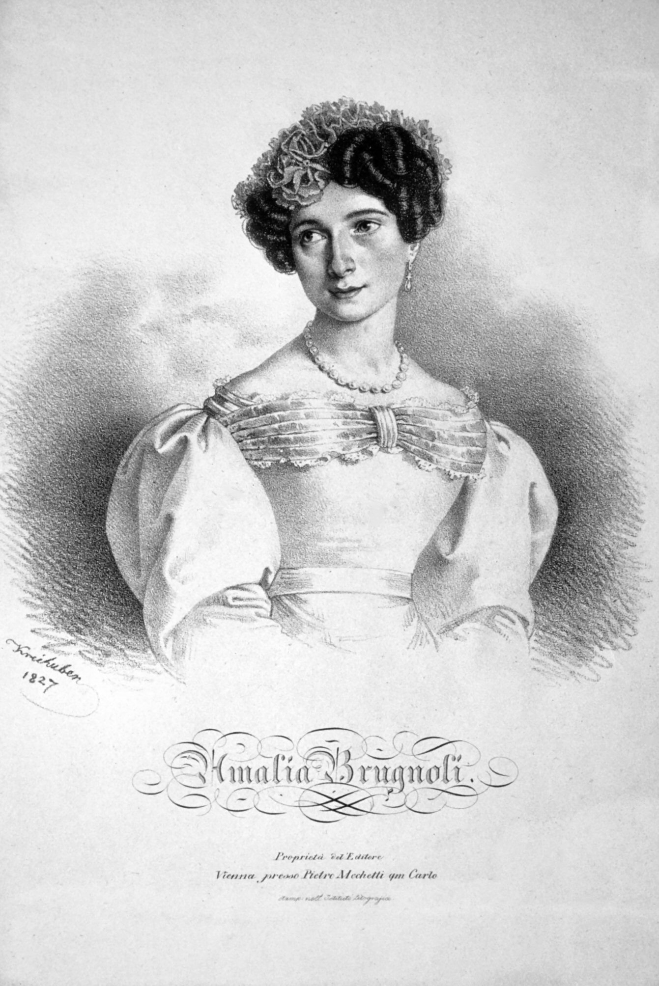 Amalia Brugnoli-Samengo (1802-1892), italienische Tänzerin. Wurzbach 259 (Werksverzeichnis Kriehuber)